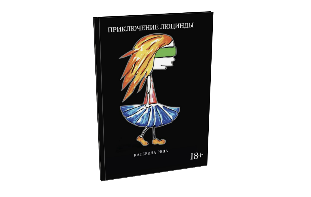 Книга